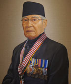 Foto dari Lukisan